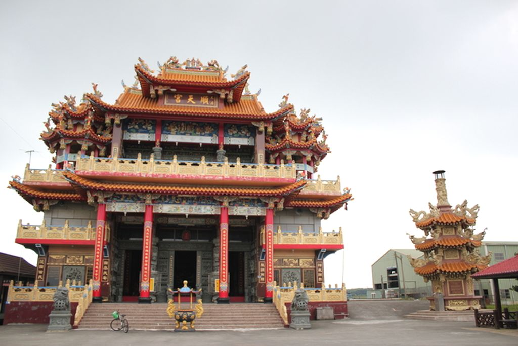 雲林縣褒忠鄉中民村大廍45之1號－大廍順天宮。